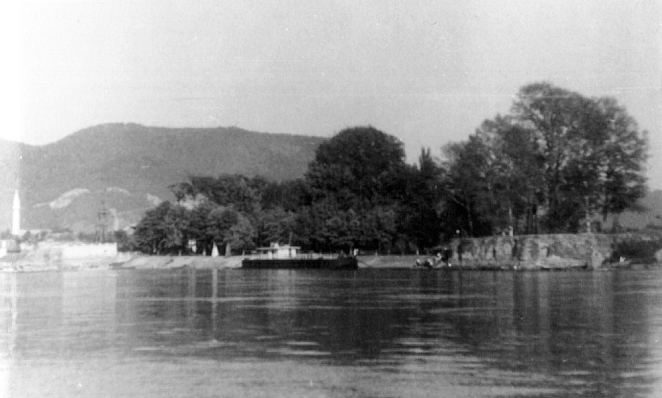 Ada Kaleh island